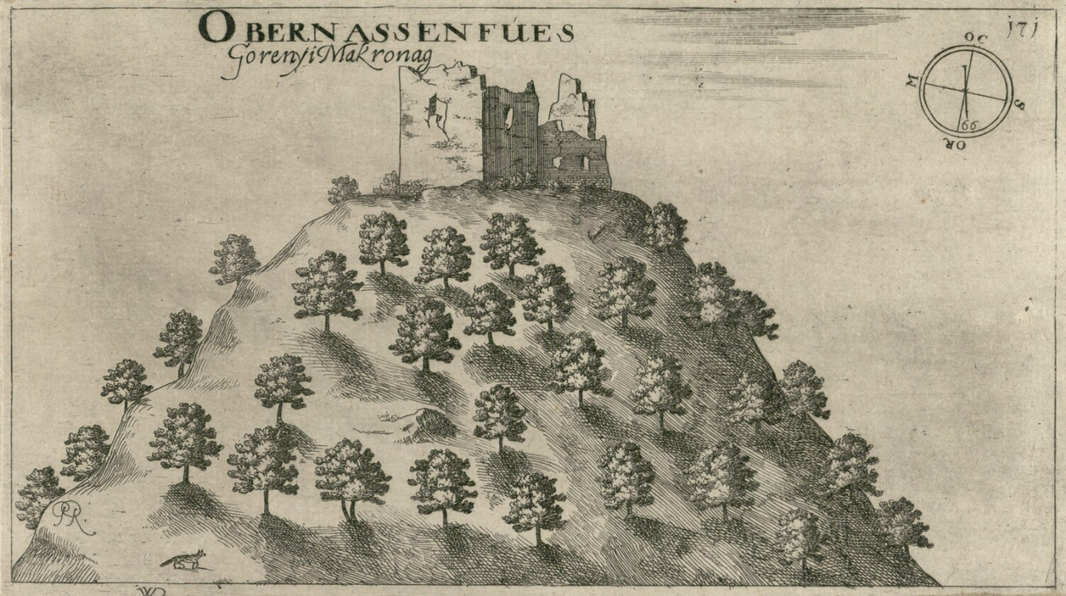 Grad Gorenji Mokronog